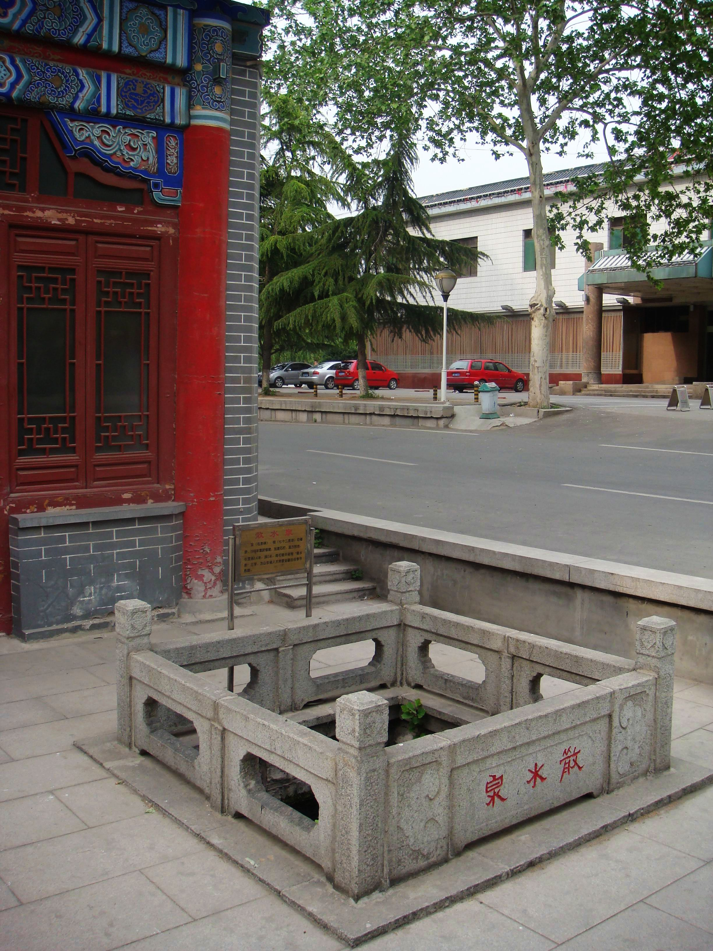 济南散水泉，七十二名泉之一。